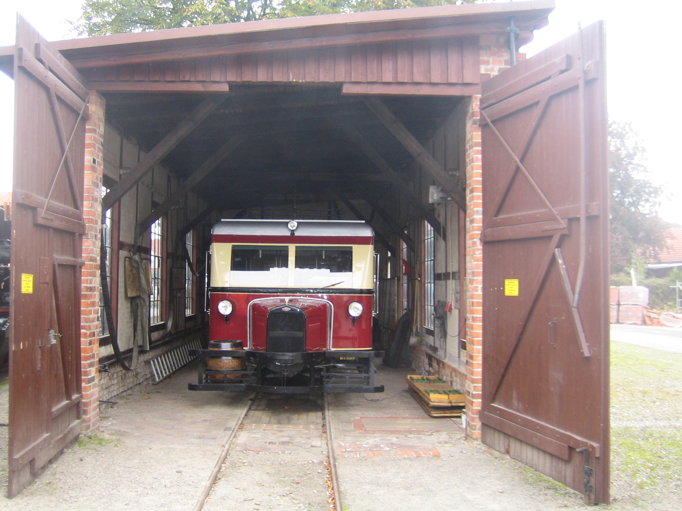 DEV T 41 im Lokschuppen Asendorf